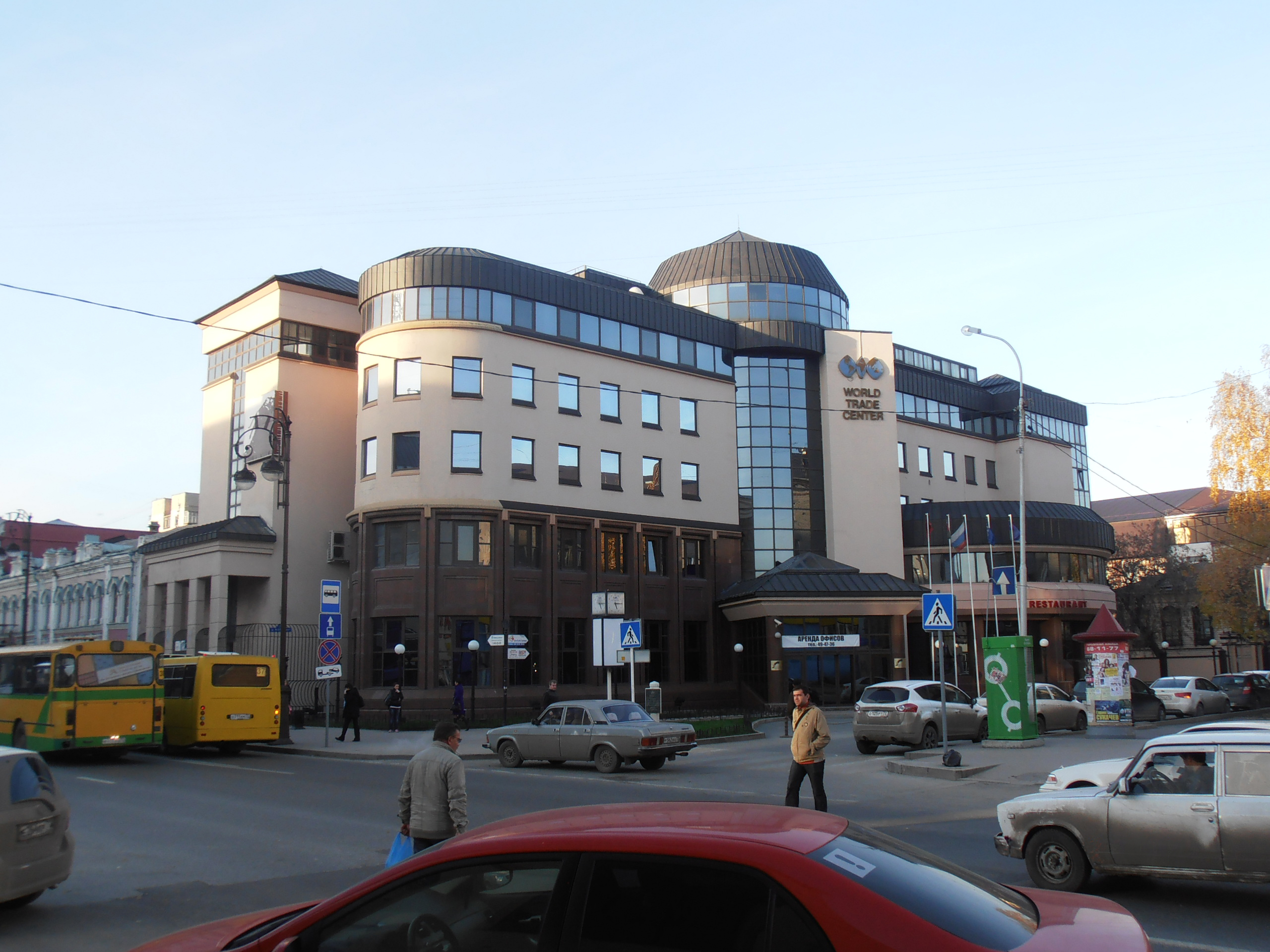 Офисное здание (г. Тюмень, ул. Республики, 33)